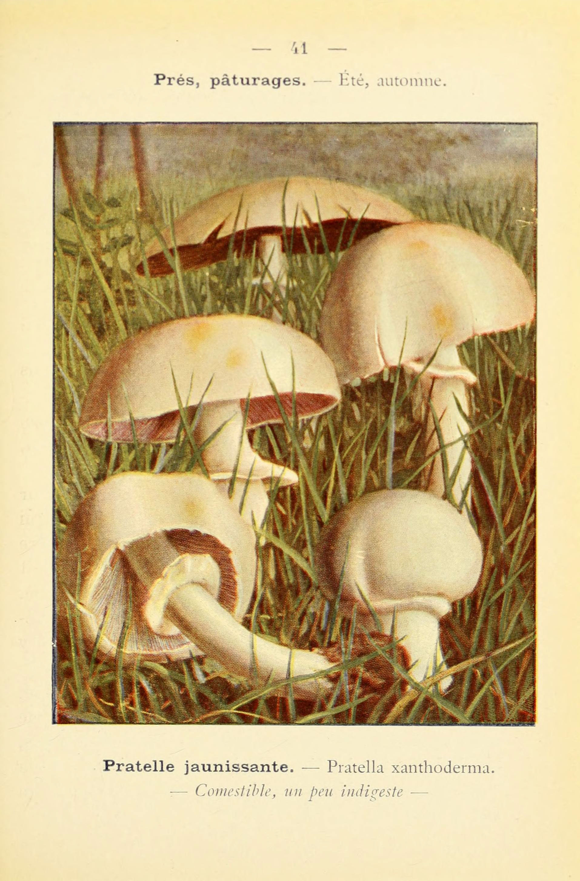 41 - Prés, pâturages. — Été, automne. Pratelle jaunissante. — Pratella xanthoderma. — Comestible, un peu indigeste —